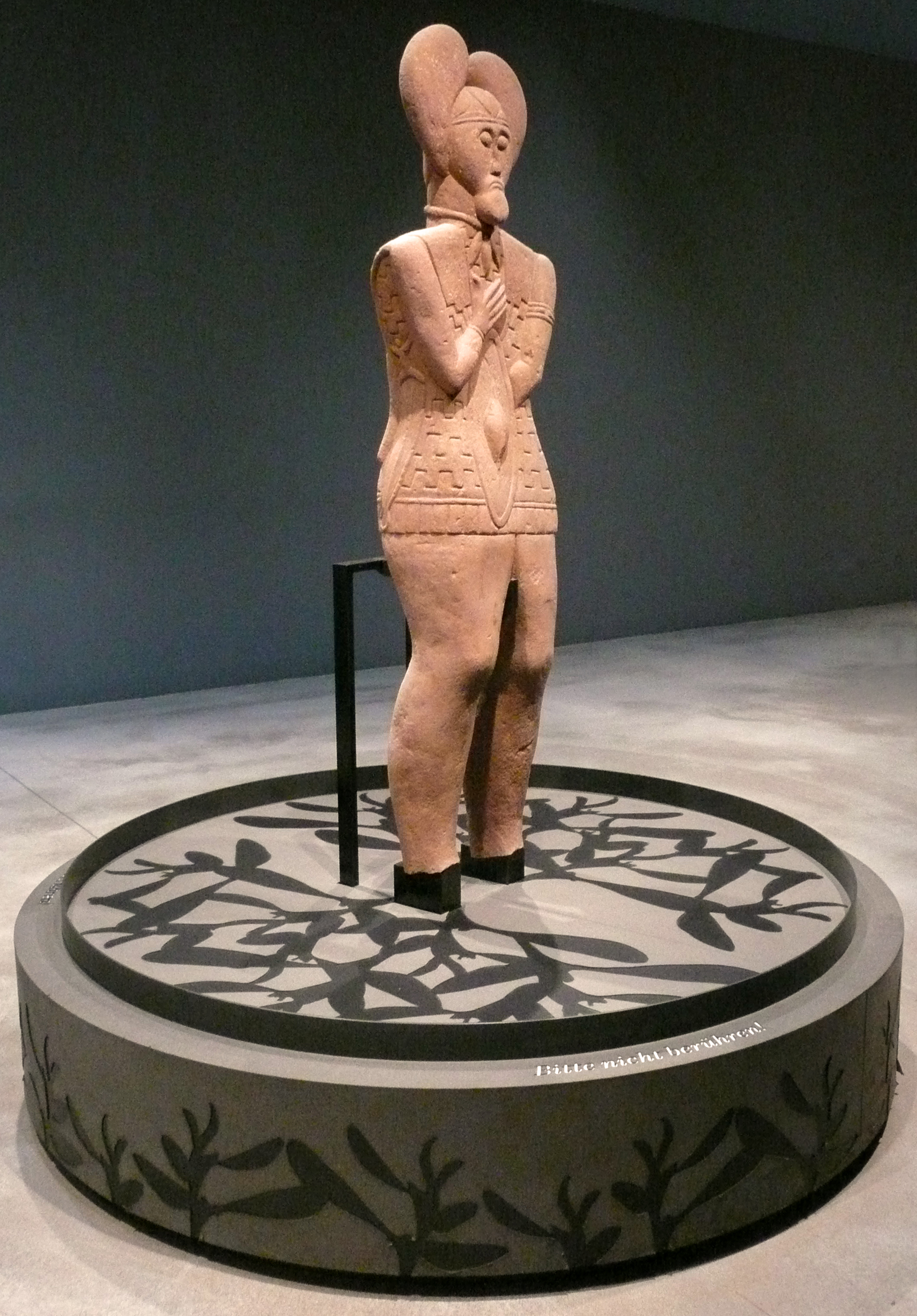 Lebensgroße Sandsteinstatue des 'Keltenfürst vom Glauberg' aus Grab 1 am Glauberg in Hessen, ca. 500 v. Chr., Ansicht von vorne links. Ausstellungort: Museum Keltenwelt am Glauberg.